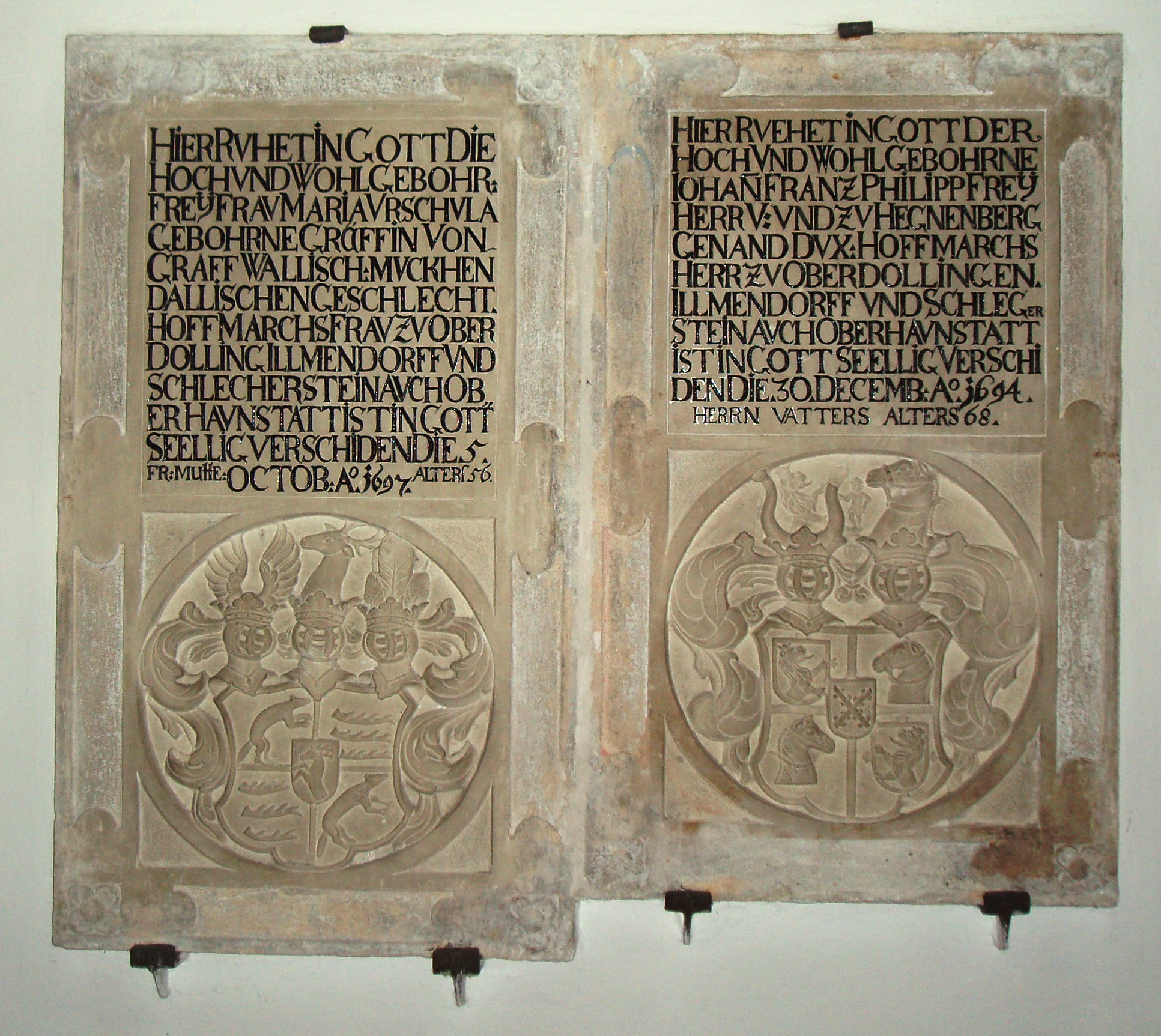 Oberdolling,_katholische_Pfarrkirche_St._Georg,_Epitaphe_des_17._Jahrhunderts